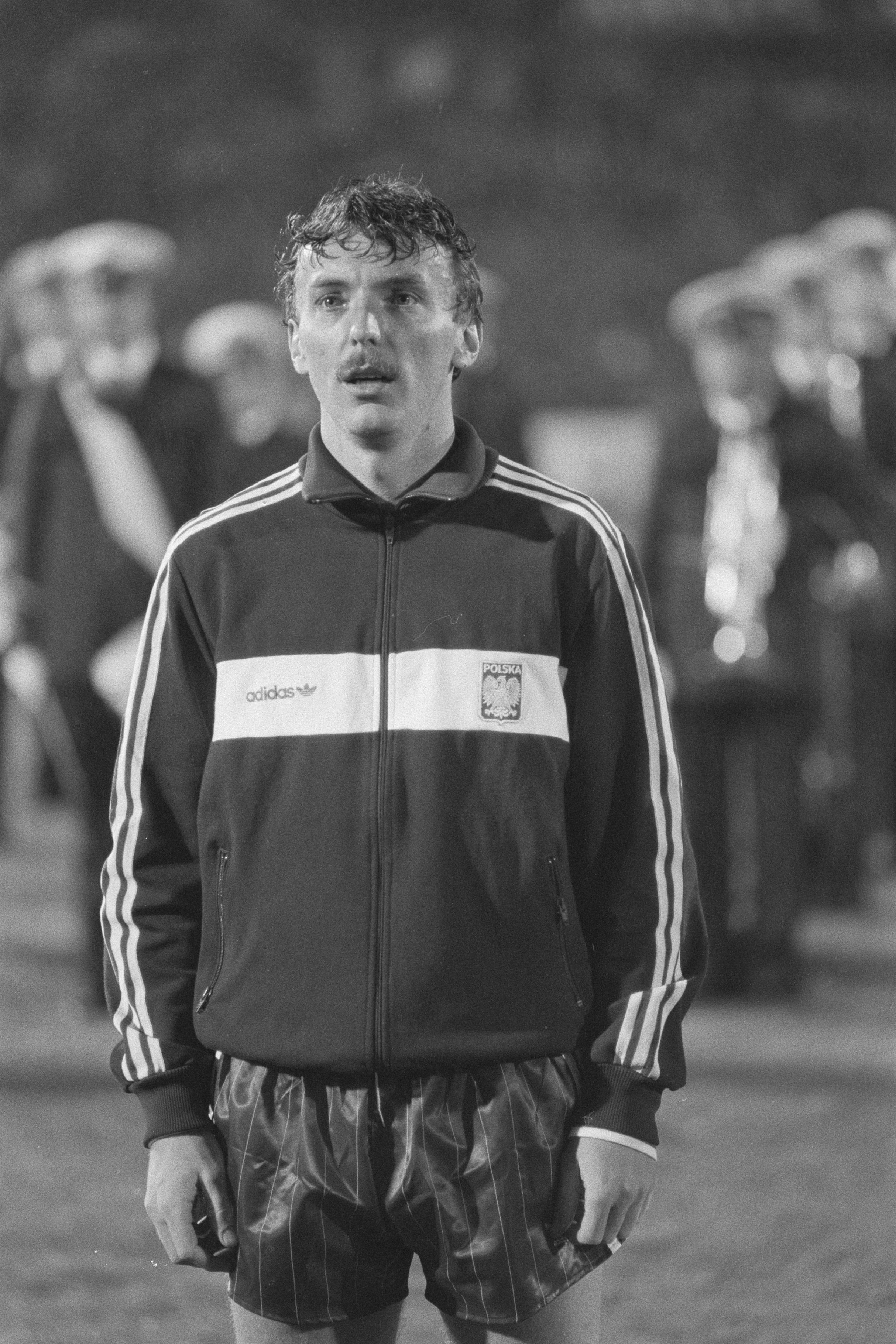 Collectie / Archief : Fotocollectie Anefo Reportage / Serie : [ onbekend ] Beschrijving : Nederland tegen Polen 0-0 in Olympisch Stadion in Amsterdam; Lazarek, nr. 11, 12: Boniek Datum : 19 november 1986 Locatie : Amsterdam, Noord-Holland Trefwoorden : sport, voetbal Persoonsnaam : Boniek Instellingsnaam : Olympisch Stadion Fotograaf : Molendijk, Bart / Anefo Auteursrechthebbende : Nationaal Archief Materiaalsoort : Negatief (zwart/wit) Nummer archiefinventaris : bekijk toegang 2.24.01.05 Bestanddeelnummer : 933-8193